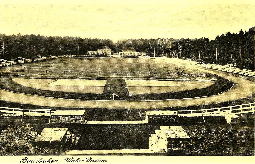 Waldstadion Aachen um 1927/1928